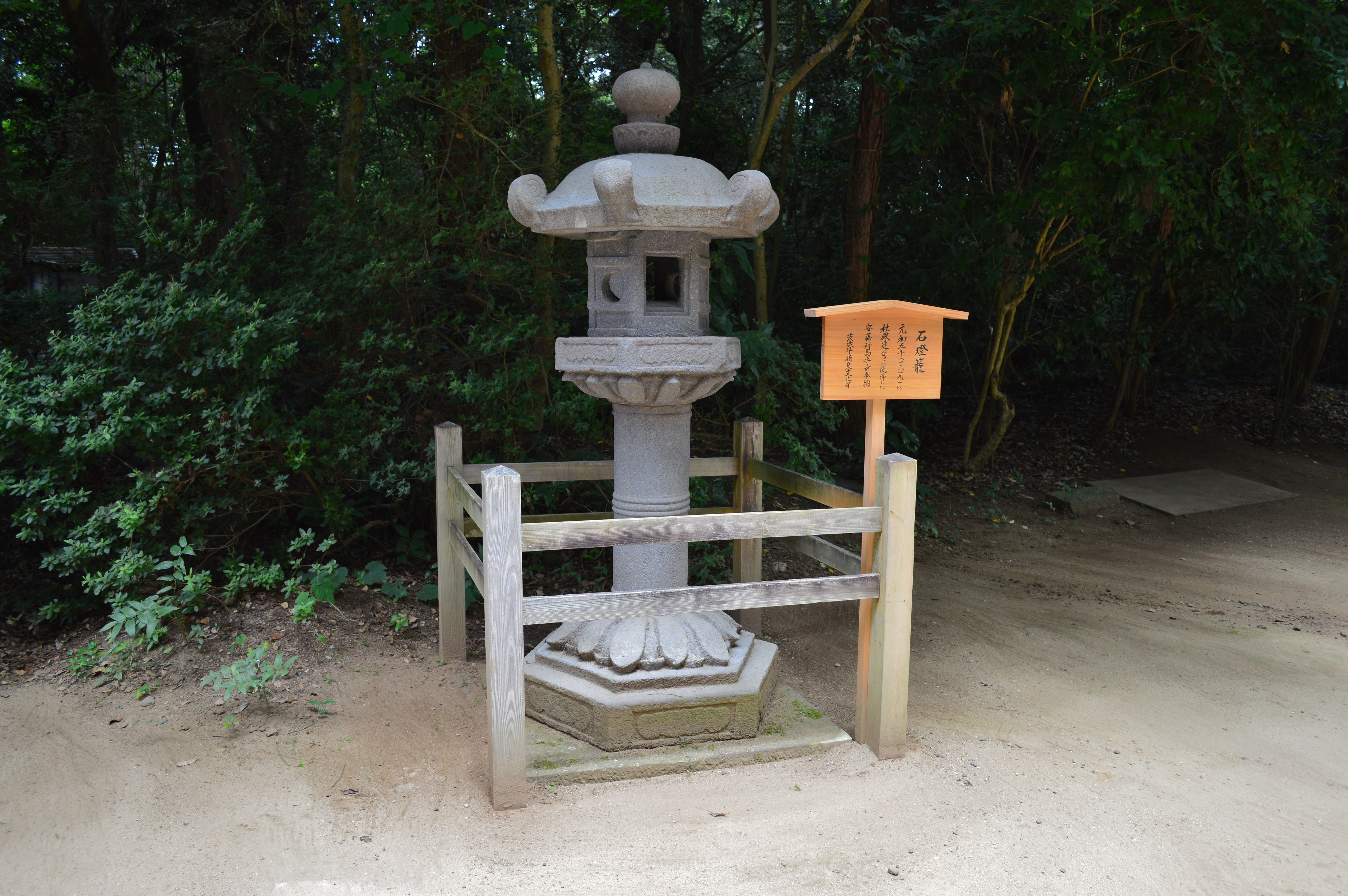 鹿島神宮 石燈籠